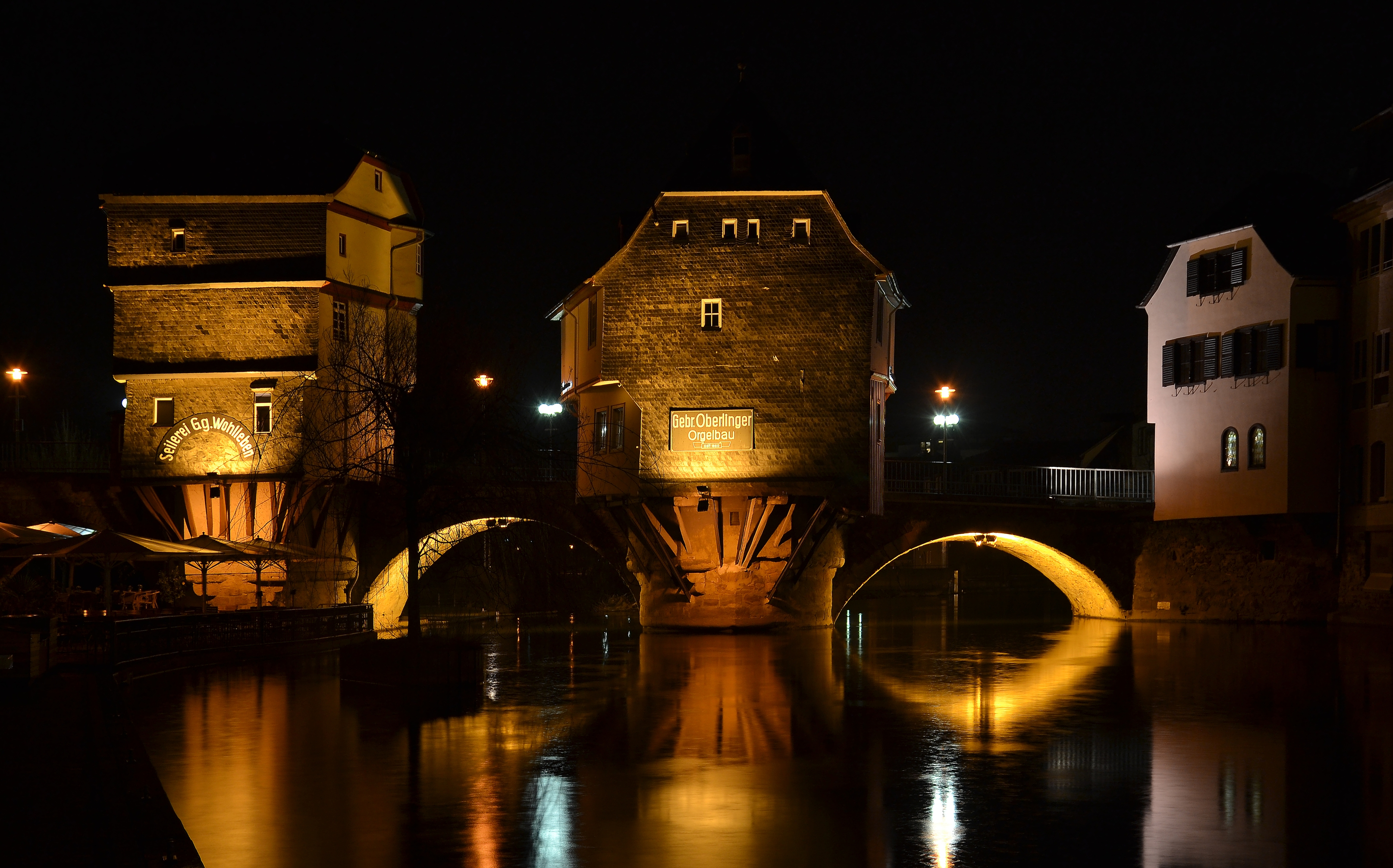 Alte Nahebrücke bei Nach, Bad Kreuznach